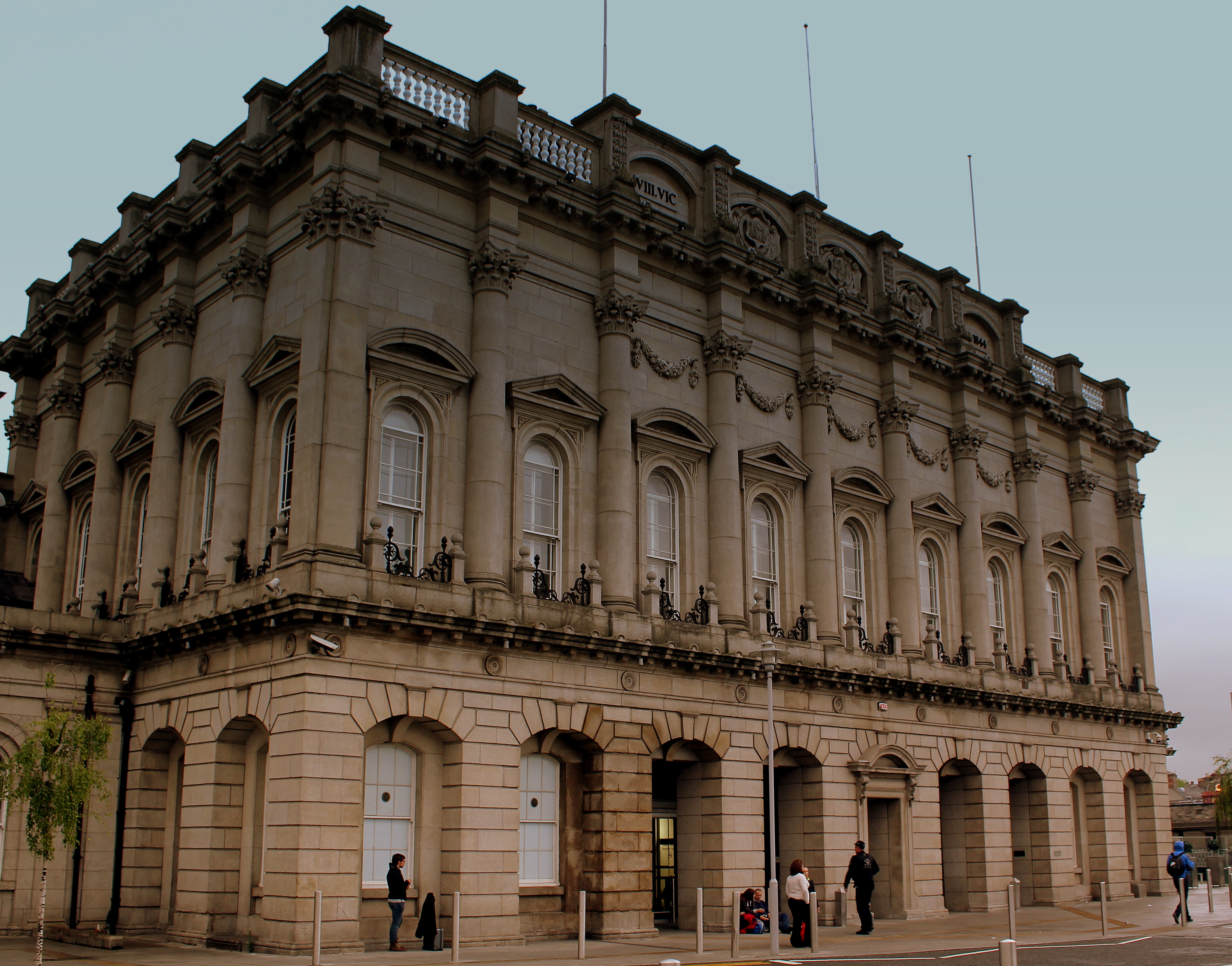 HEUSTON STATION DUBLIN IRELAND JULY 2013